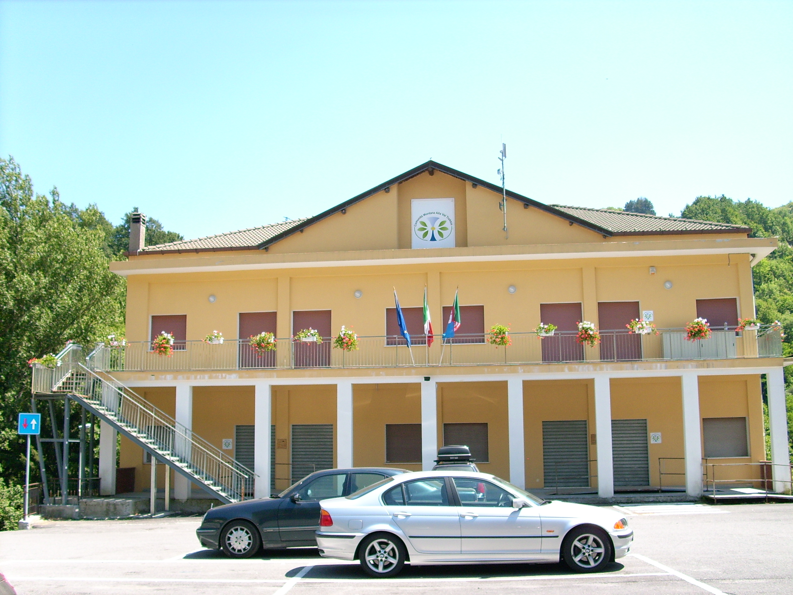 Sede della Comunità Montana Alta Val Trebbia a Montebruno, Liguria, Italia